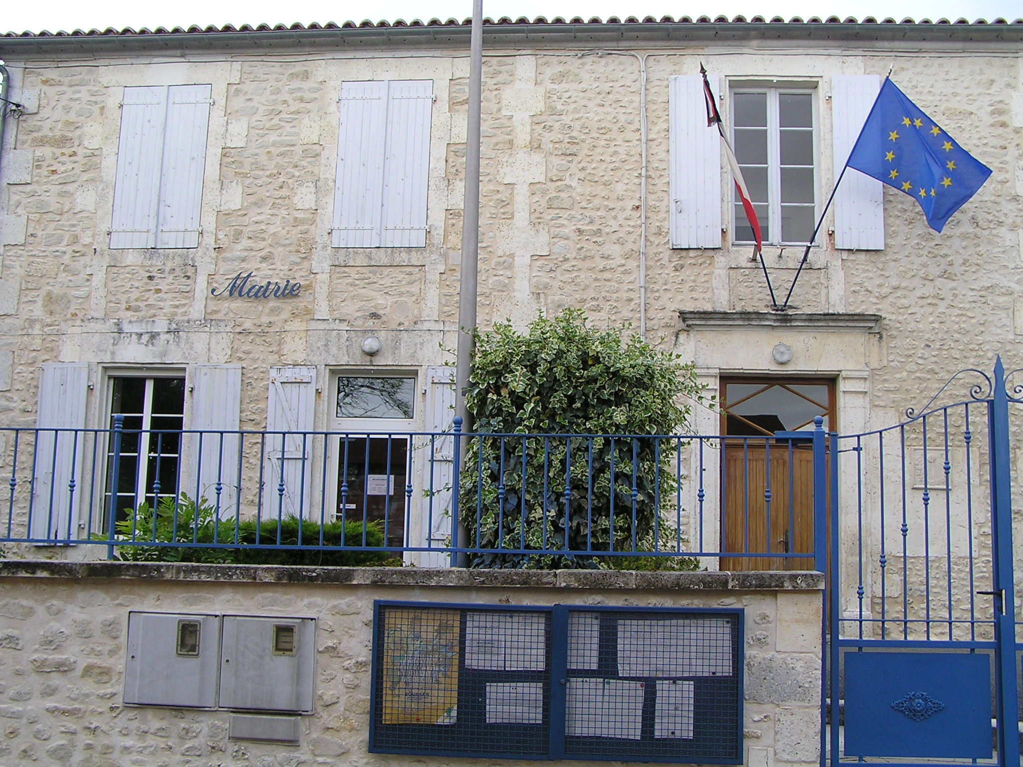 mairie d'Aignes-et-Puypéroux